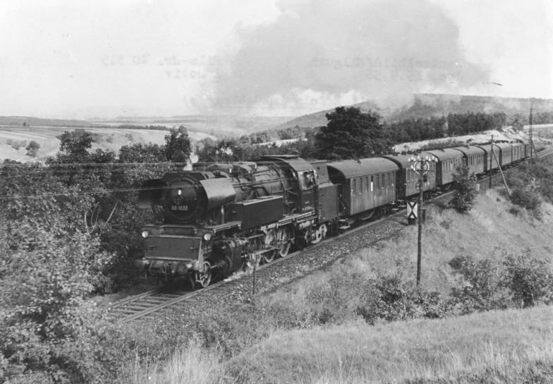 Dampflok 65 1033 (BR 65), Thüringer Wald ADN-ZB Ellguth-19.9.56 DDR: Einen 65er Reisezug-Tenderlok fährt einen Personenzug auf einer Strecke des Thüringer Waldes.